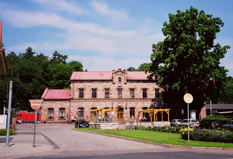 Bahnhof Heilbad Heiligenstadt, Thüringen (mit Grünanlage) - Railway station Heilbad Heiligenstadt, Thuringia, Germany